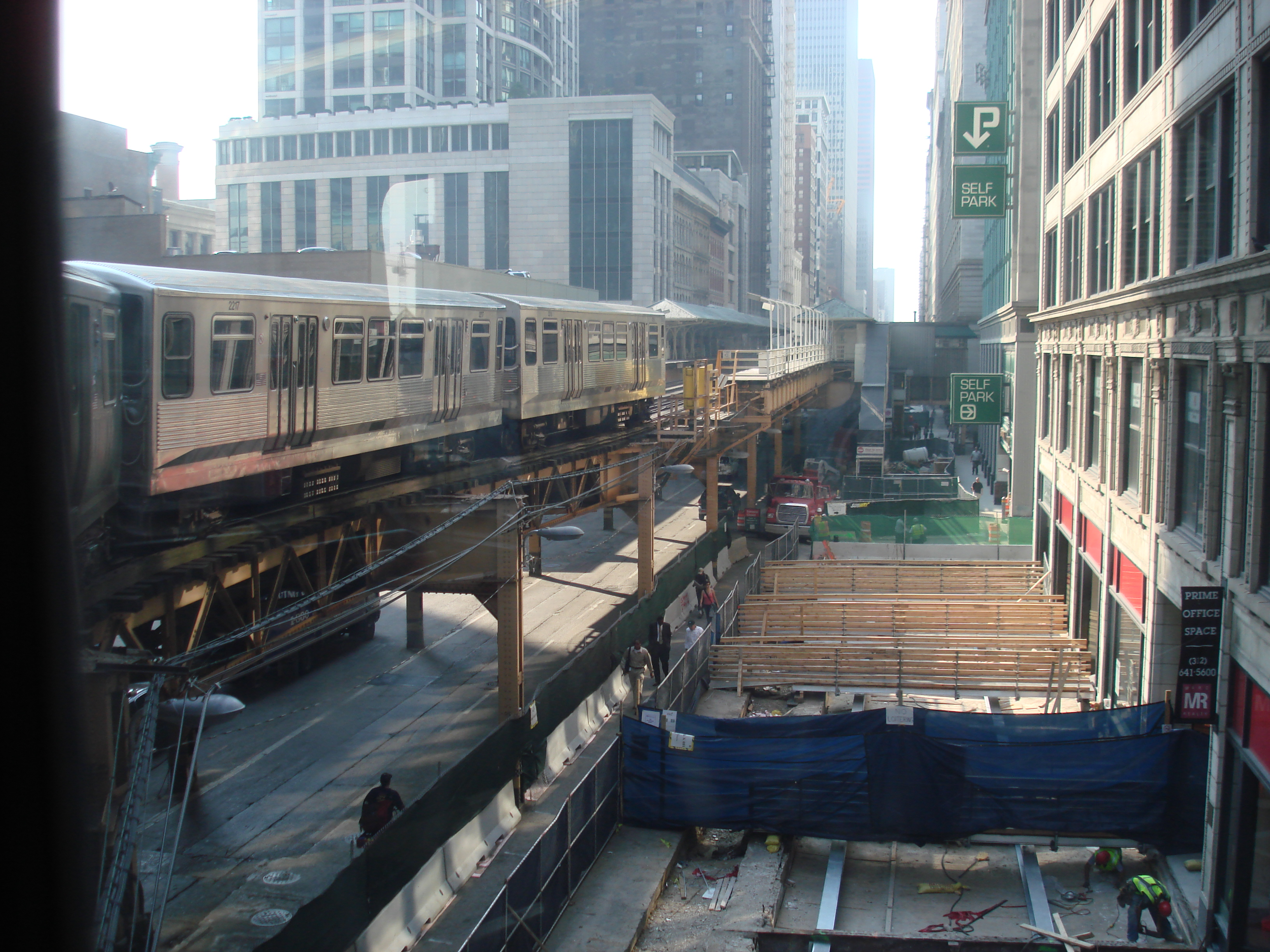 photo du loop